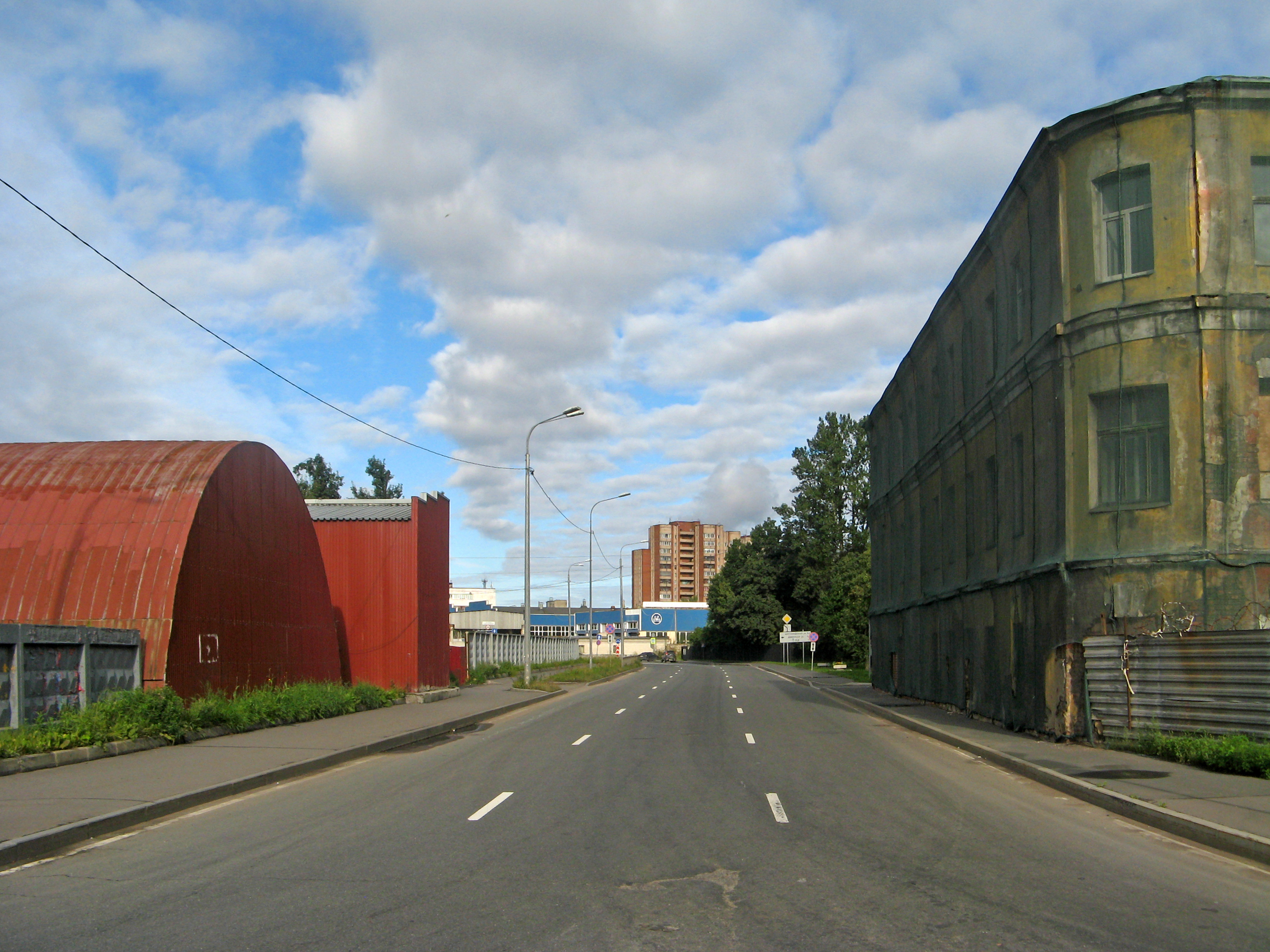 Невельская улица в Санкт-Петербурге